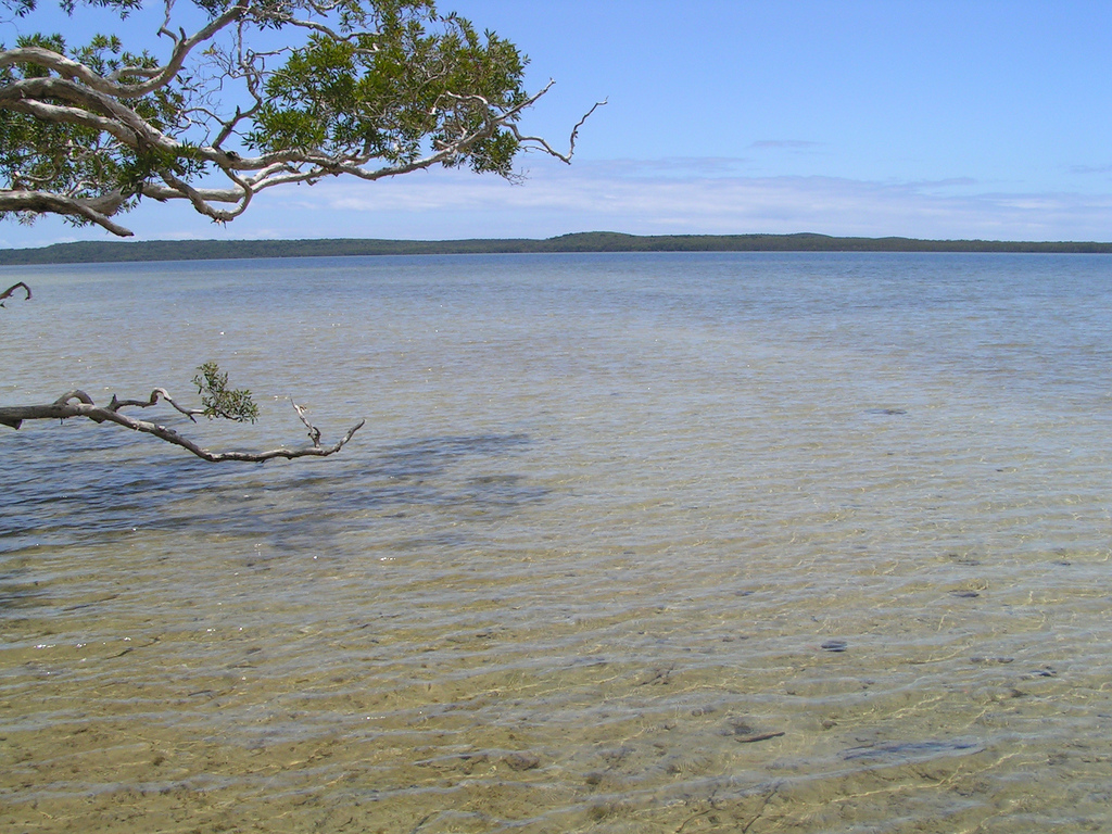 Lake Weyba, Noosa.